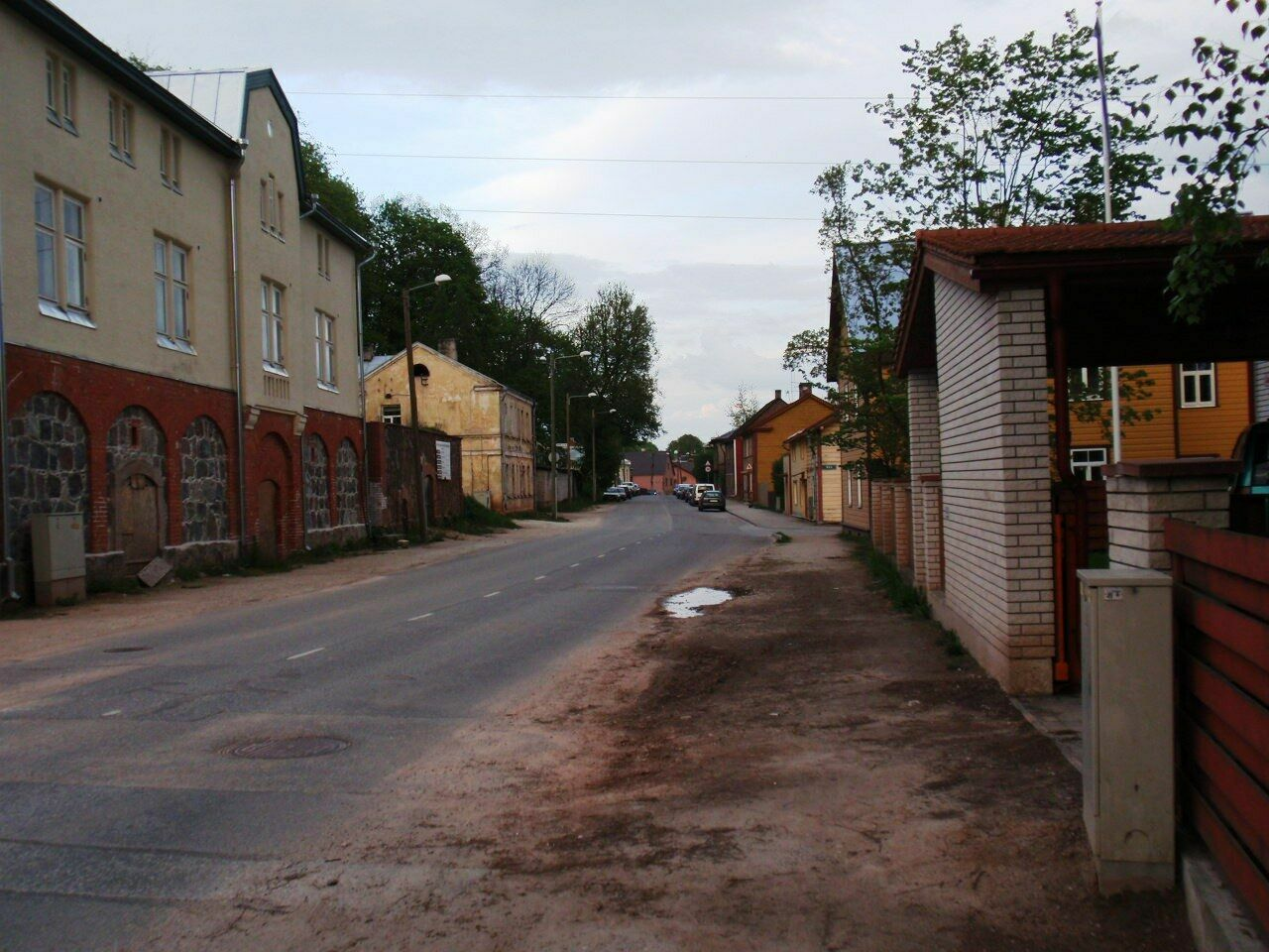 Jaama tänav Tartus.